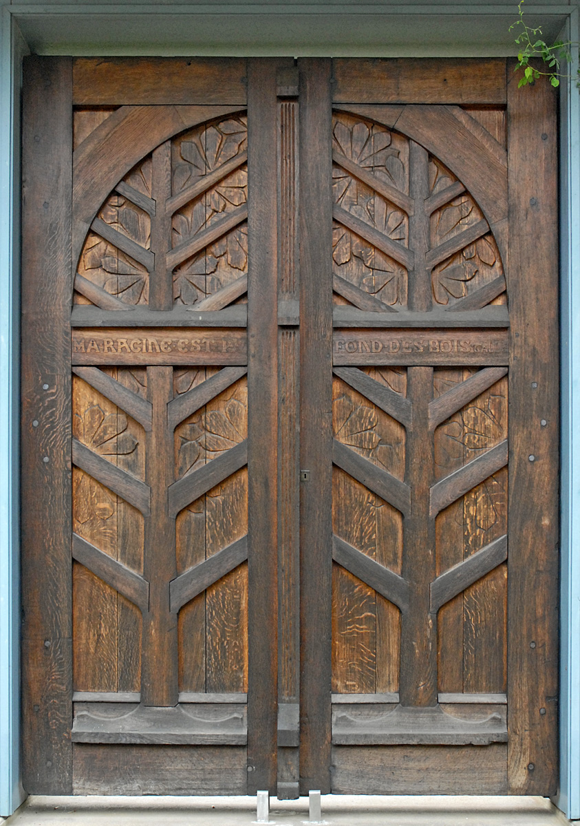 "Ma racine est au fond des bois" est la devise qu'Emile Gallé avait fait inscrire sur la porte en chêne sculptée en 1897 par l'ébéniste Eugène Vallin, pour son entreprise de l'avenue de la Garenne, à Nancy. Elle est exposée depuis 1964 (coté nord) dans le jardin du musée de l'Ecole de Nancy. Au niveau stylistique, elle a subi les influences de l'art médiéval, du japonisme, du naturalisme et du rationalisme, comme l'indique le cartel.